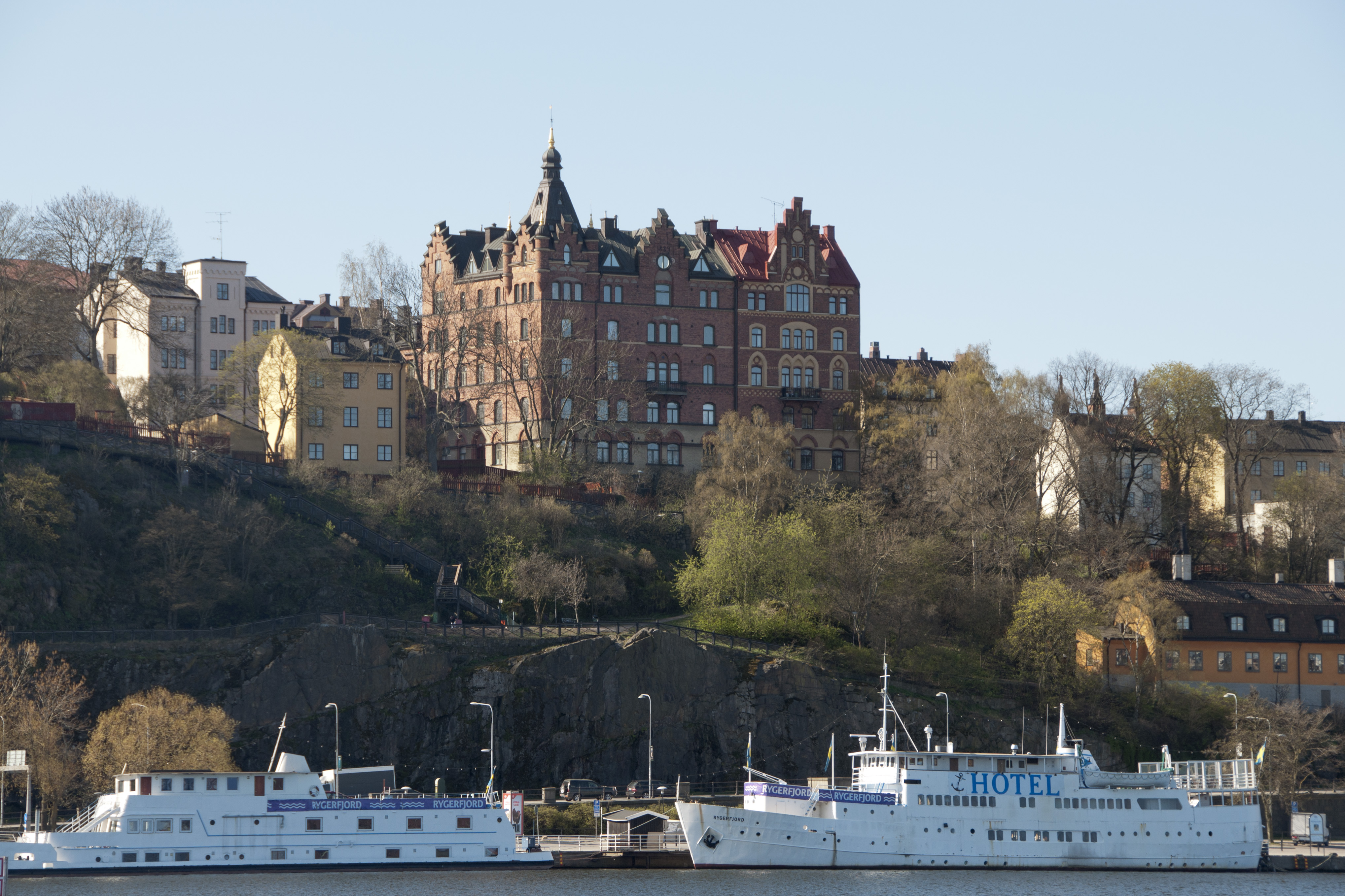 Kvarteret Kattfoten Mindre, Mälarborgen på Timmermansgatan 2A/ Bastugatan 38, Byggnadsår 1889, Arkitekt Gustaf Hermansson. Bastugatan 40, Byggnadsår 1889-90 Arkitekt Gustaf Hermansson. Vid kajen M/S Rygerfjord